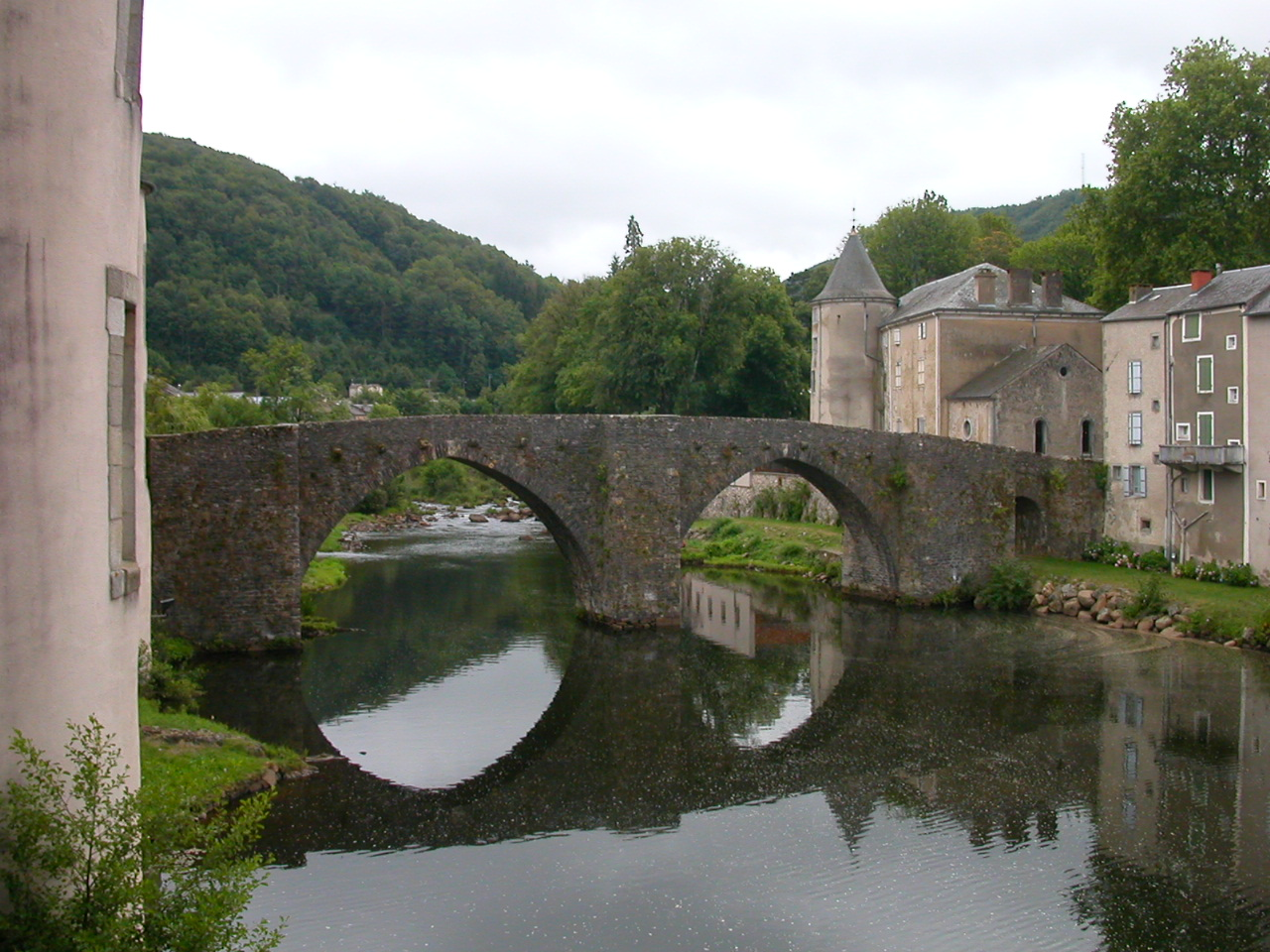 Pont sur l'Agout, Brassac, Tarn, région Midi-Pyrénées, Province du Languedoc, FranceBrezhoneg: Ar pont kozh, Brassac, Lengadòc .